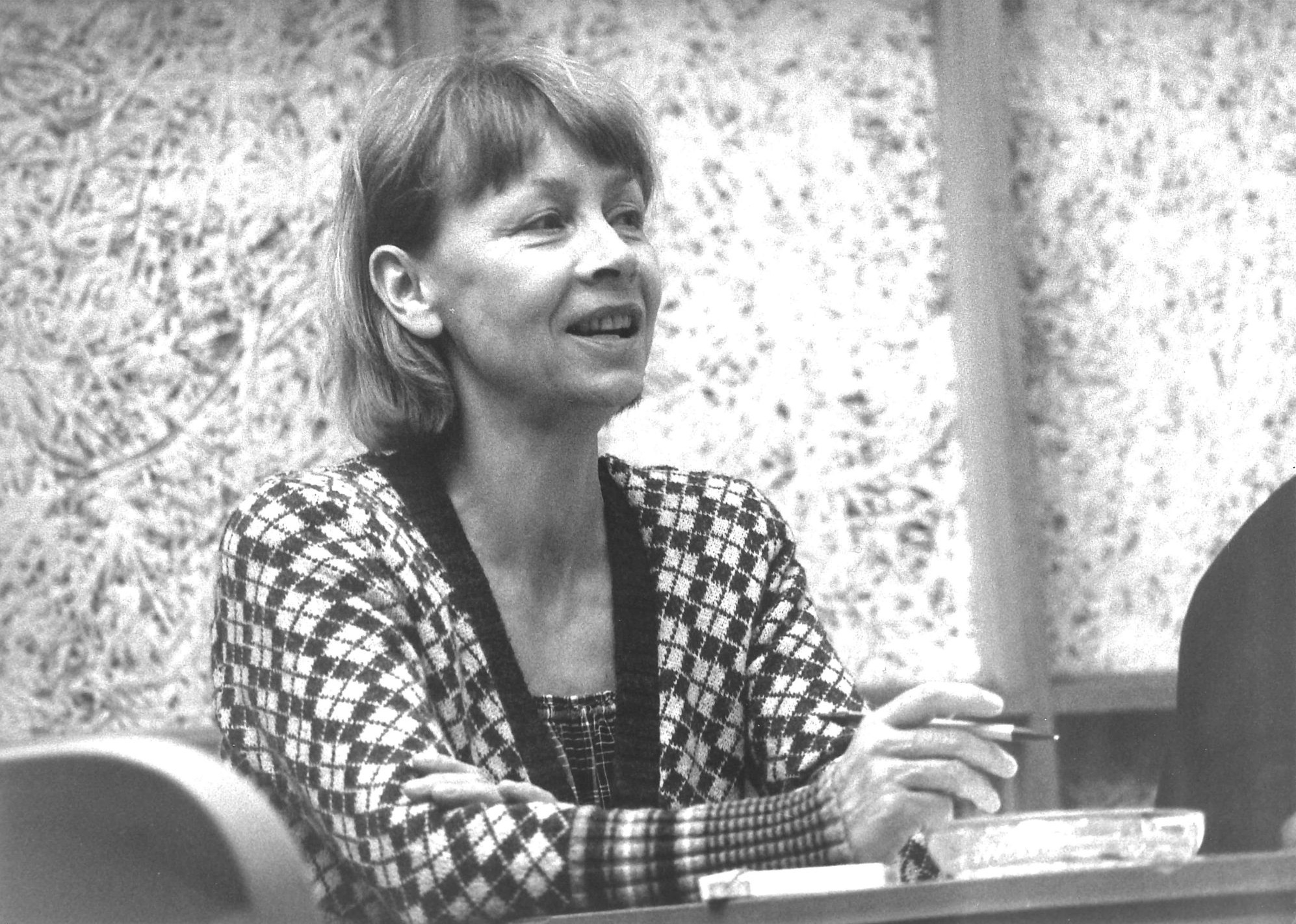 Die Schauspielerin Jutta Hoffmann bei einer Hörspielproduktion between 1990 and 1995 date QS:P,+1990-00-00T00:00:00Z/8,P1319,+1990-00-00T00:00:00Z/9,P1326,+1995-00-00T00:00:00Z/9 in einer Aufnahme des Berliner Fotografen Werner Bethsold.